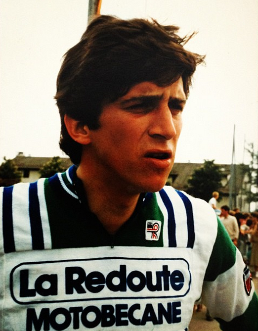 Jean Marie Michel - Coureur cycliste, équipe la Redoute-Motobecane, 1979